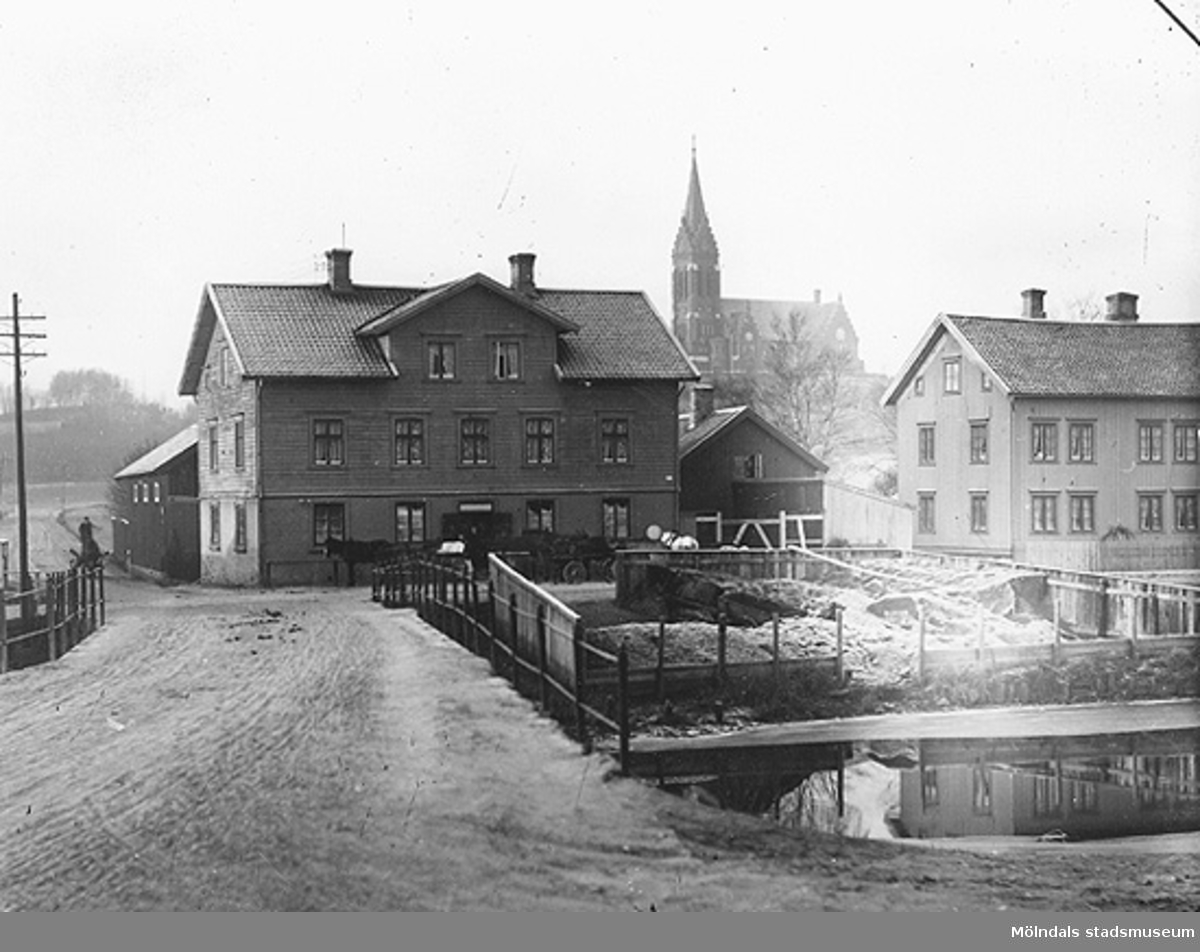 Gamla Mölndalsbro innan spårväg och stensättning tillkom i området. Fässbergs kyrka ses i bakgrunden. Före 1900-tal. Fotografering 1890-1900.